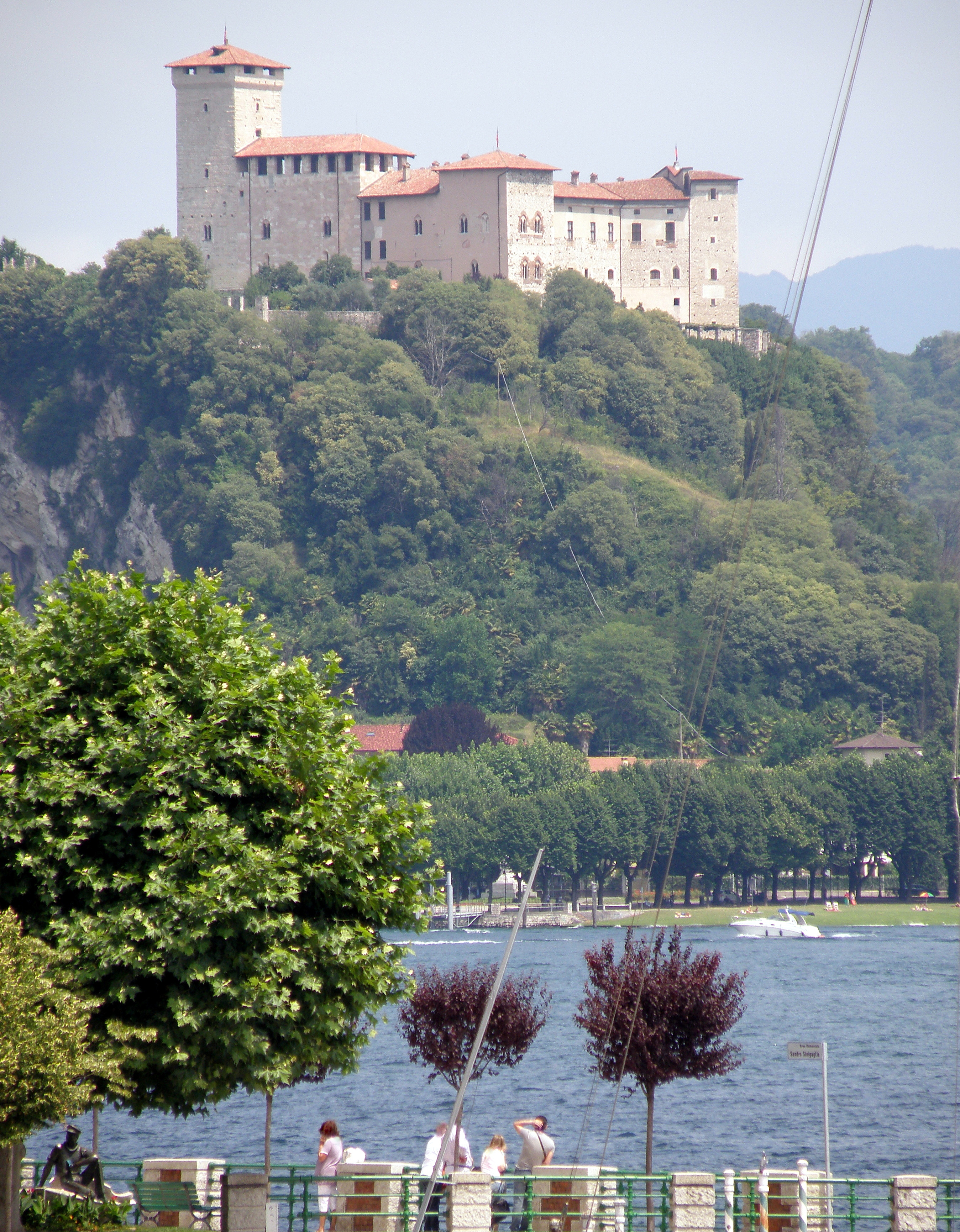 Forteresse d'Angera (en italien Rocca di Angera), juchée sur son éperon rocheux, surplombant la localité italienne d'Angera, dans la province de Varèse, sur la rive orientale (lombarde) du lac Majeur. Flancs occidental (à gauche) et méridional (à droite) du château. Vue prise (au téléobjectif) depuis Arona, sur la rive opposée (piémontaise) du lac Majeur, à une distance d'env. 2km. À l'avant-plan, quai du lac à Arona.